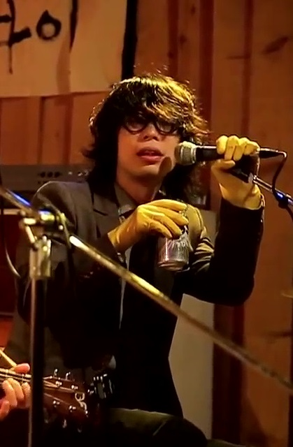 살롱바다비에서 '카페 작업 블루스'를 부르는 대한민국의 가수 깜악귀